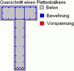 Schema einer internen Vorspannung